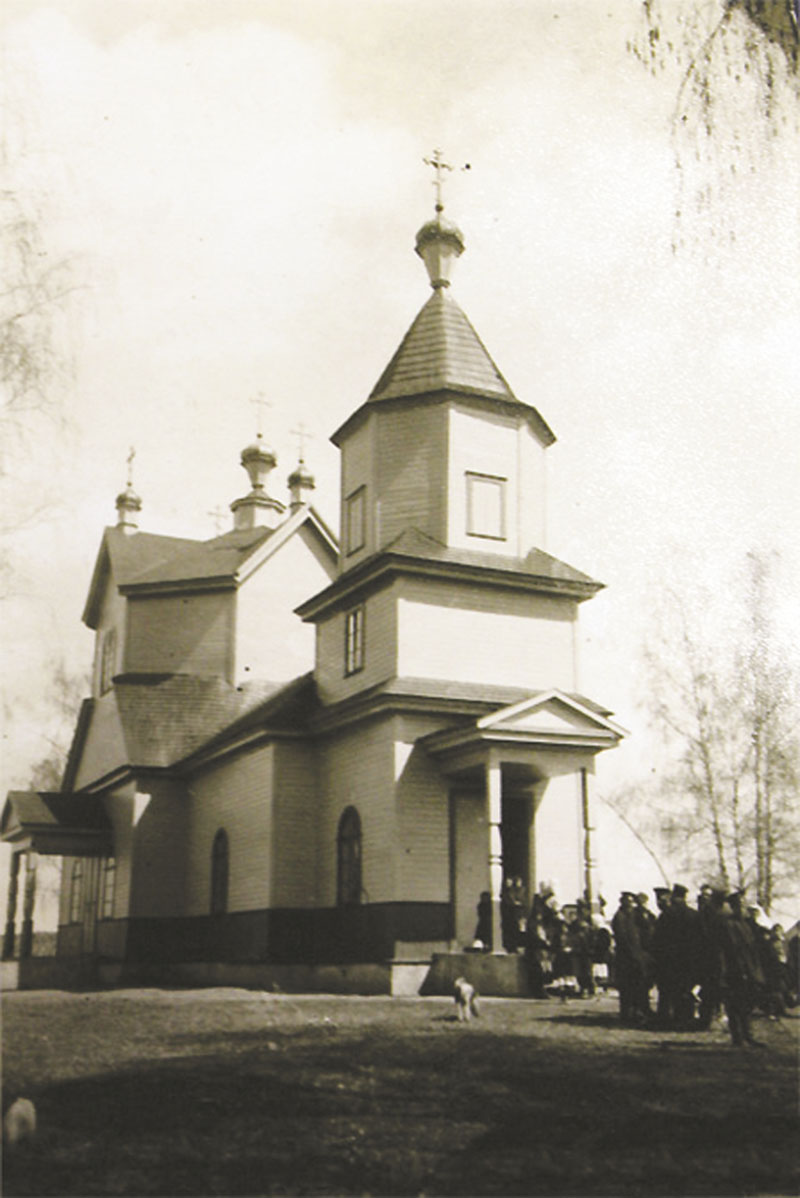 Пакроўская царква. 1910 г. в. Вялікія Чучавічы